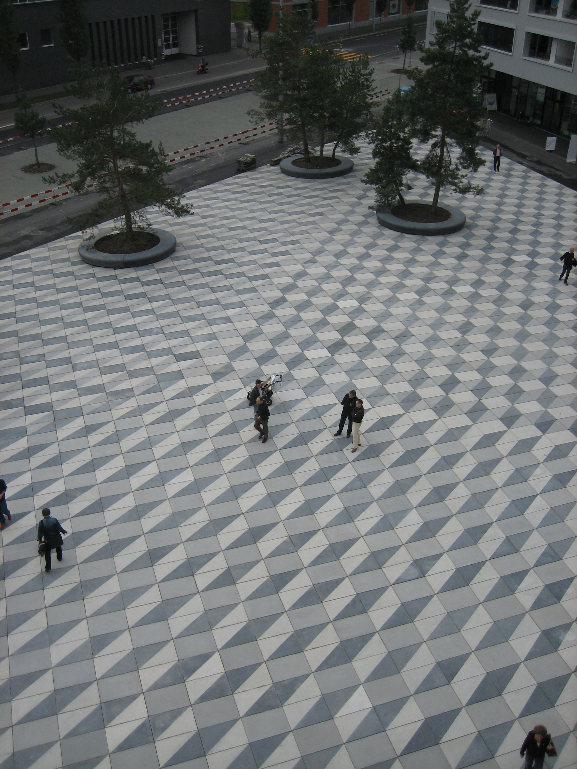 Ansicht von oben